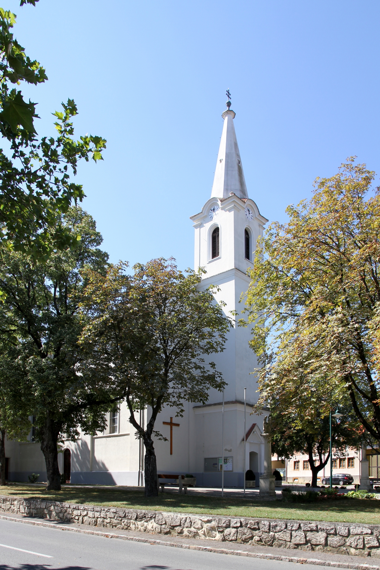 Katholische Pfarrkirche Hl. Dreifaltigkeit in Kroatisch Minihof, ein Ortsteil der burgenländischen Gemeinde Nikitsch. Ein einfacher Saalbau mit vorgestelltem dreigeschossigen Südturm auf dem baumbestandenen Anger. Die Kirche wurde 1731 errichtet und 1874 erneuert.